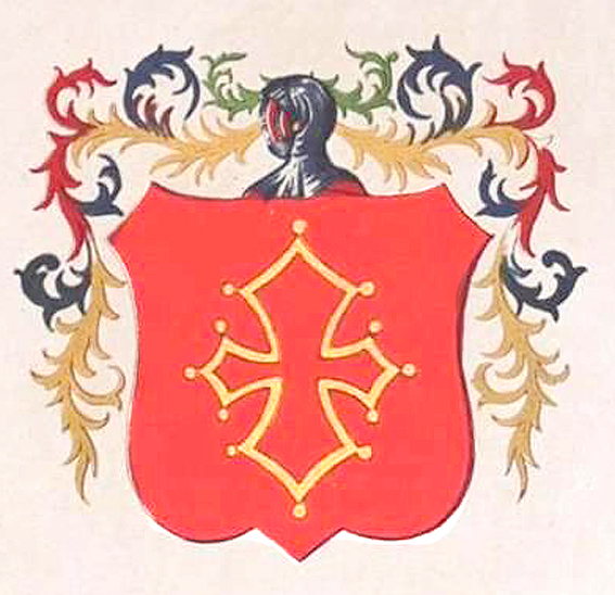 Stemma Mozzi di Firenze